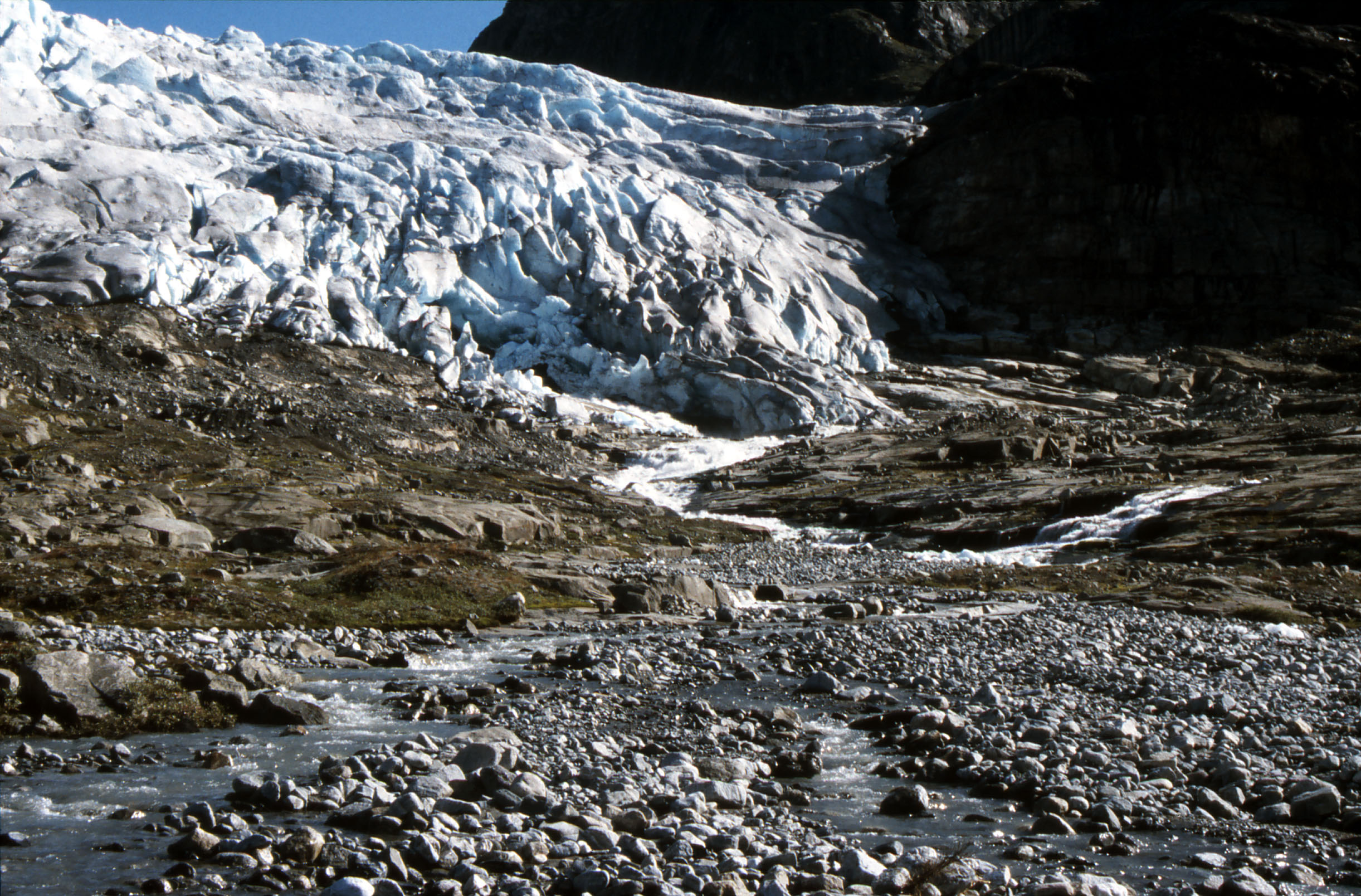 Gletscherzunge Rembesdalskåka im Westen des Hardangerjøkul.